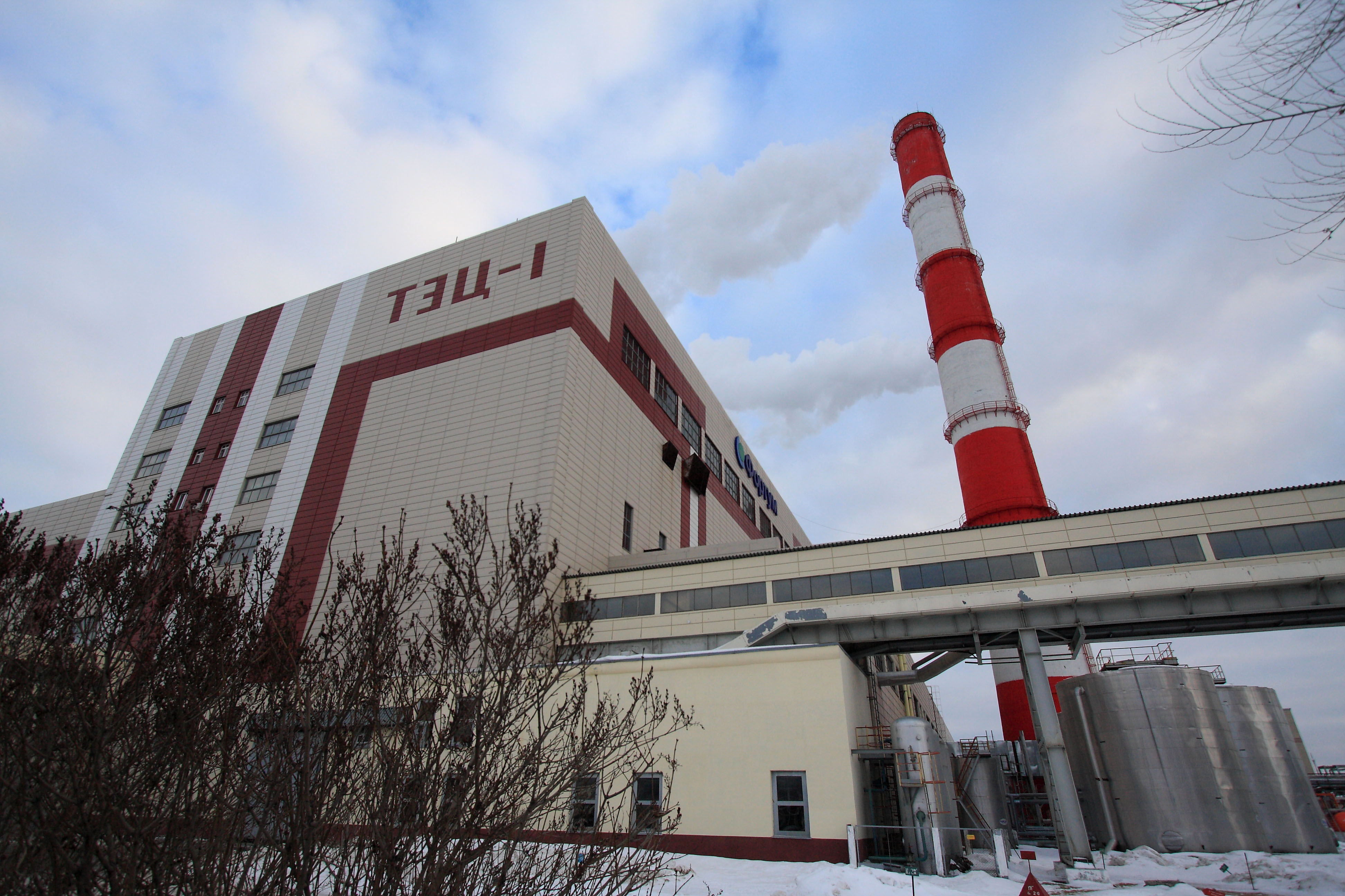 Тюменская ТЭЦ-1